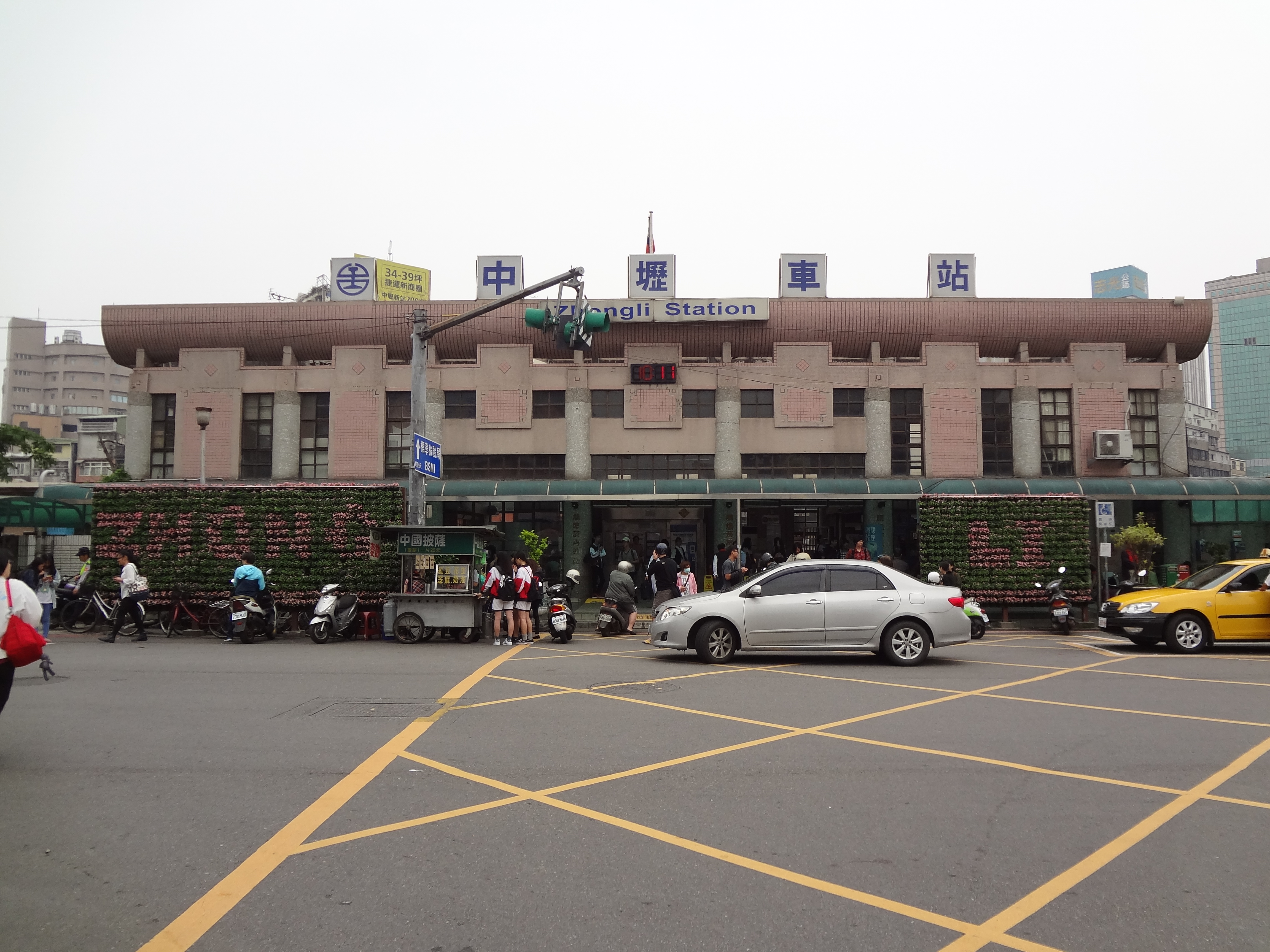 中文（台灣）: 臺灣鐵路管理局中壢車站後站。